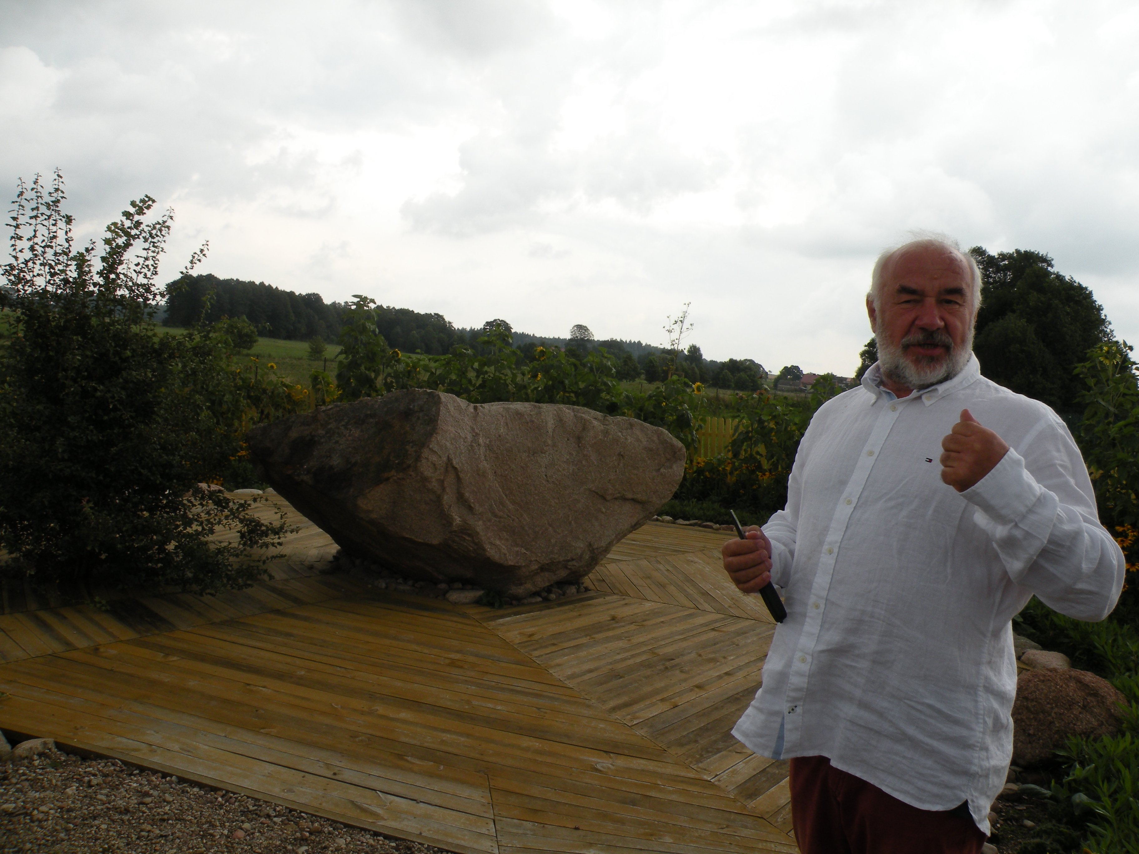 W czasie Dnia Motyla, Rajskie Ogrody w Garncarskiej Wiosce w Kamionce koło NIdzicy